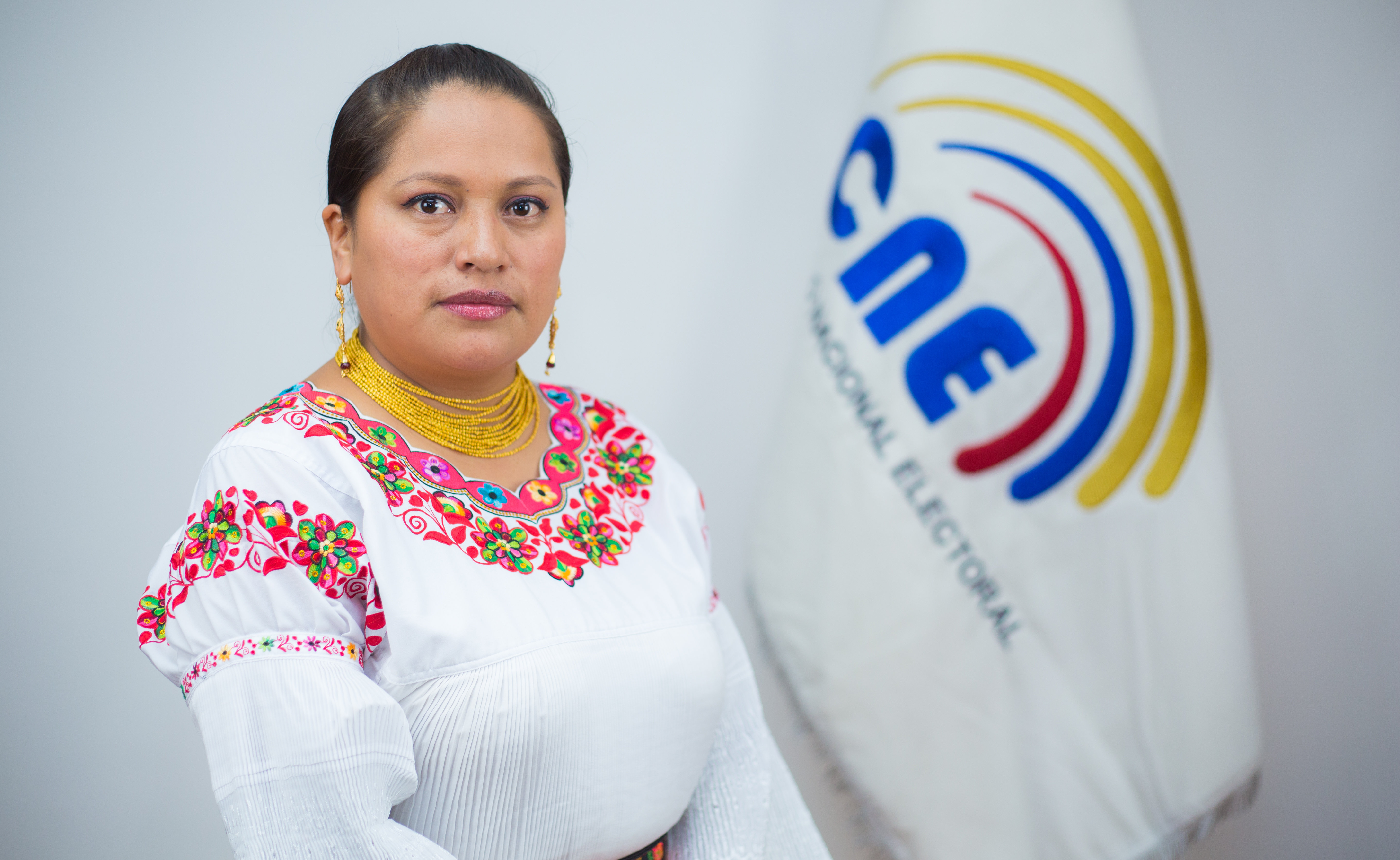 Esthela Acero, Consejera en el Consejo Nacional Electoral del Ecuador